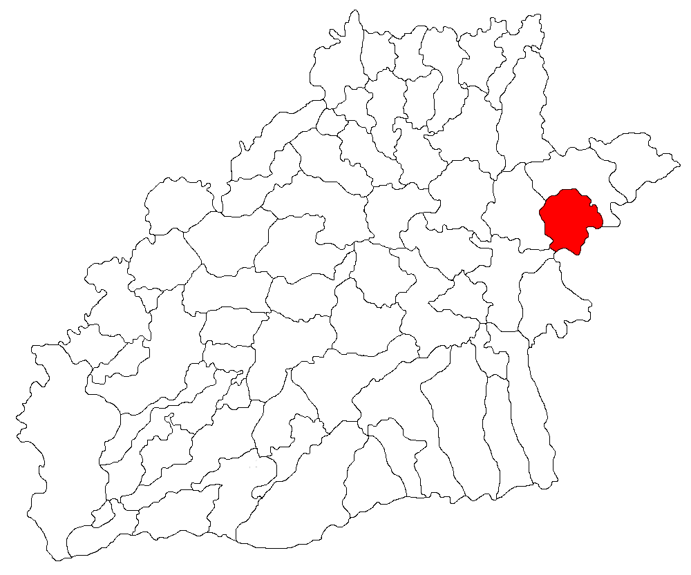 Categorie:Hărţi ale judeţului Sibiu